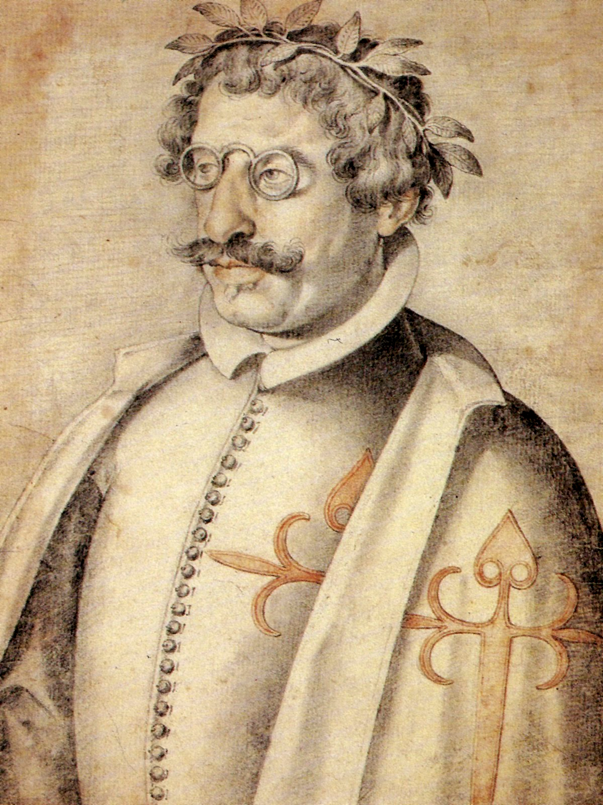 Retrato de Francisco de Quevedo en Francisco Pacheco, El libro de descripción de verdaderos retratos, ilustres y memorables varones, [Sevilla], [1599].